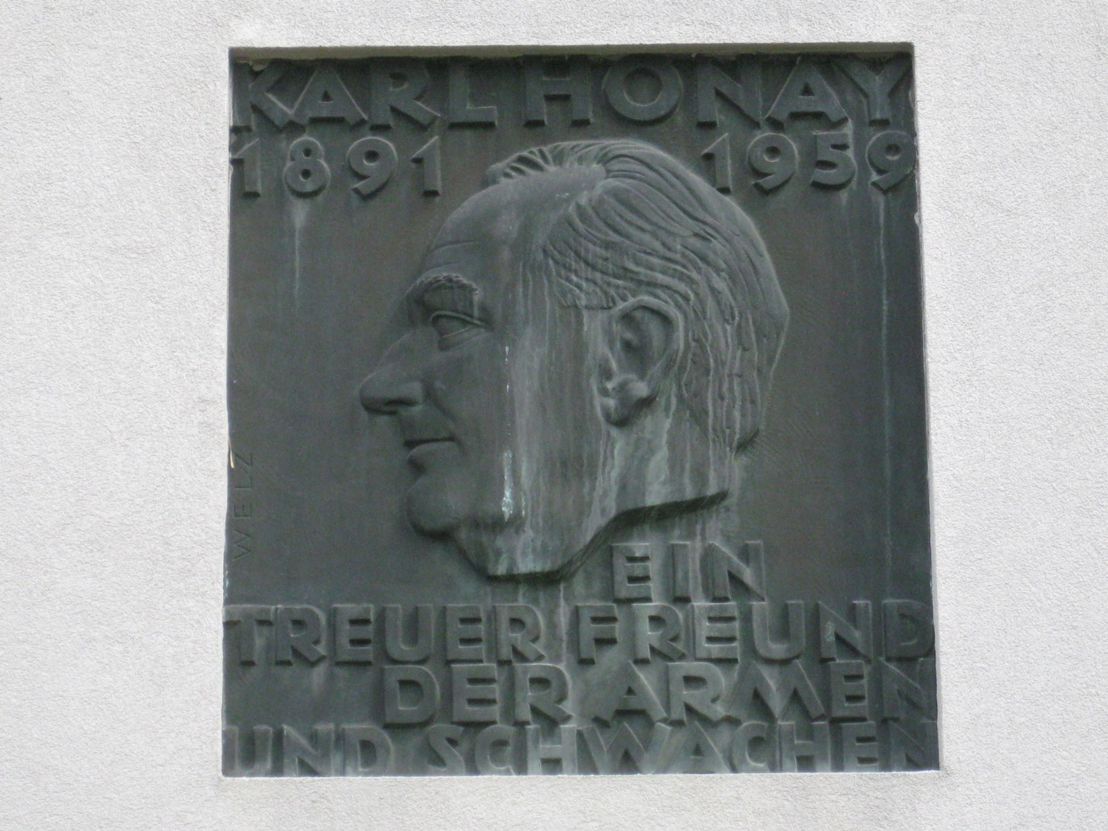 Karl Honey-Gedenktafel mit Reliefbüste von Ferdinand Welz im Karl Honay-Hof, Gablenzgasse 82-86, Wien-Ottakring. This media shows the Vienna residential building (Gemeindebau) with the ID 36 (Karl-Honay-Hof).